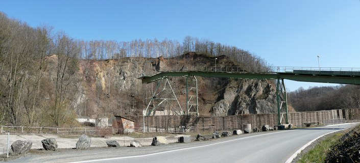 Nentmannsdorf: Blick auf den Steinbruch der ProStein GmbH